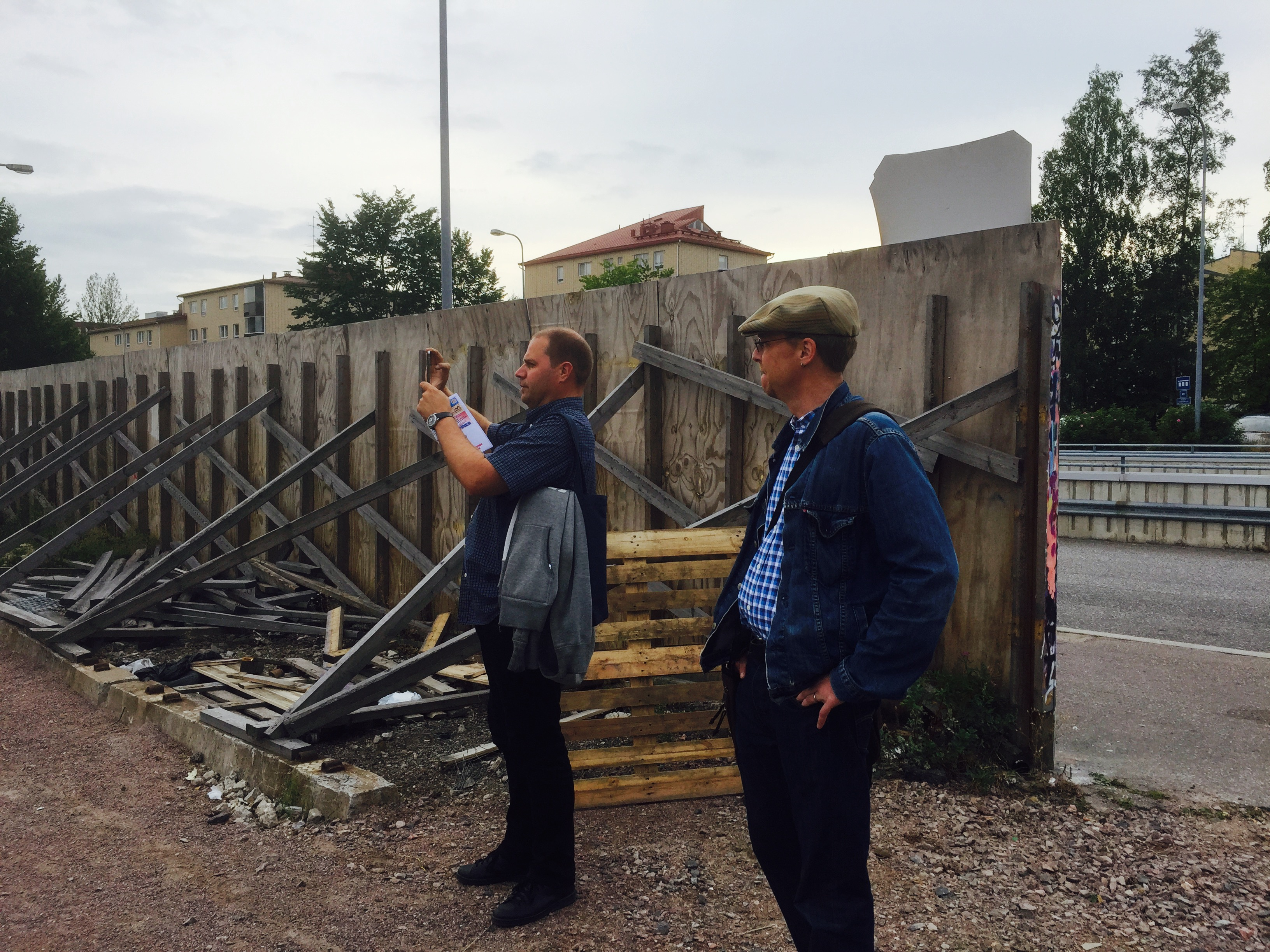 Helsingin kulttuurijohtaja Stuba Nikula kävi hakemassa virikkeitä lähiöiden kulttuuritoimintaan Myyrmäen montulta elokuussa 2015.